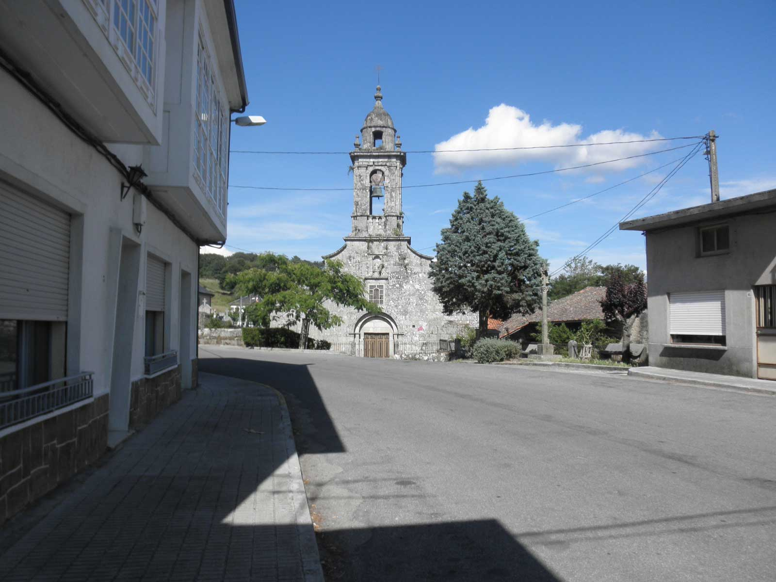 Iglesia San Xoan de Rio. Entorno O Reboledo (Ourense)